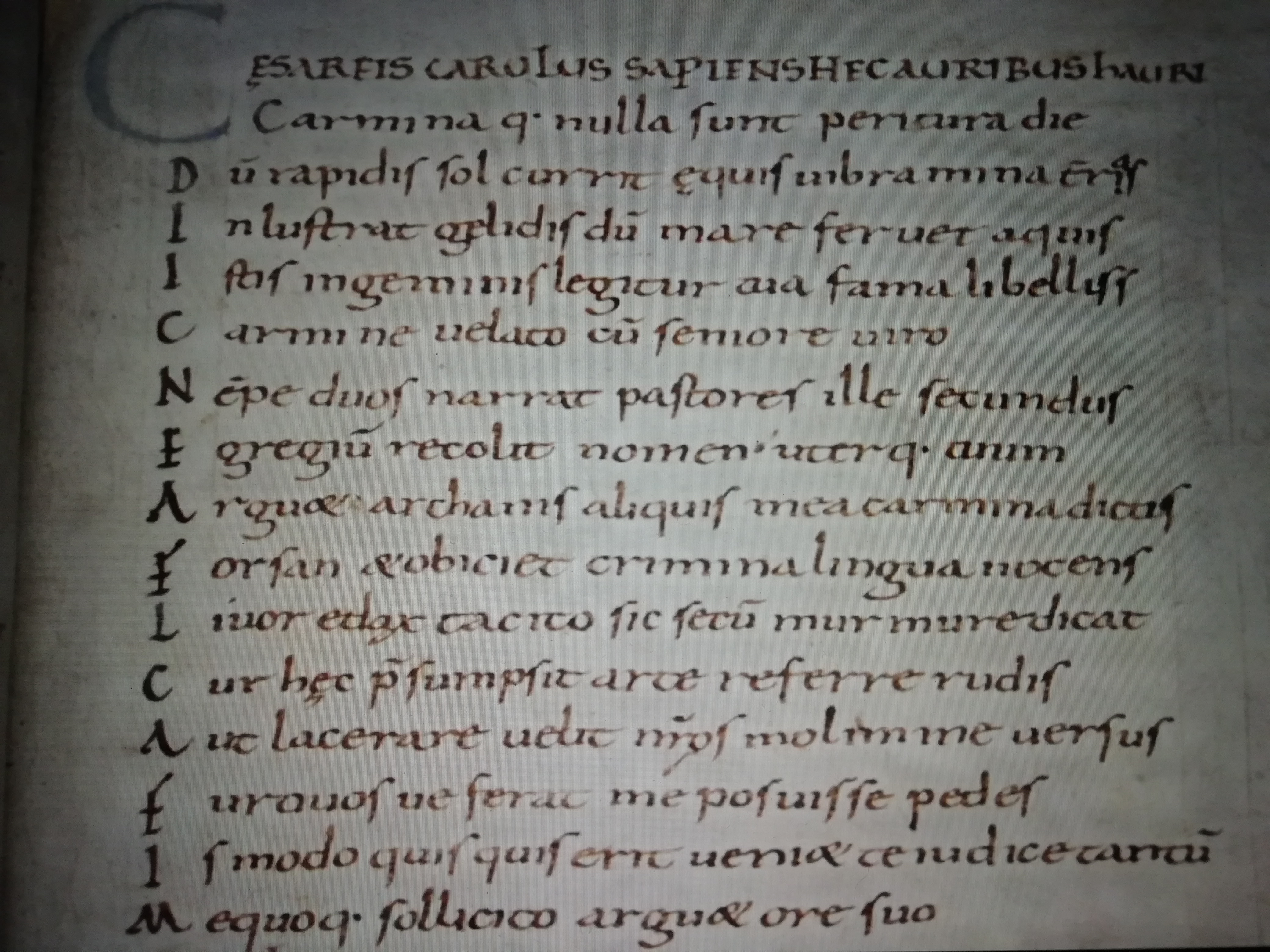 London, BL, Add. 11034 ff.37r